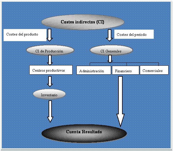 Gráfico de la asignación de costes indirectos a los productos